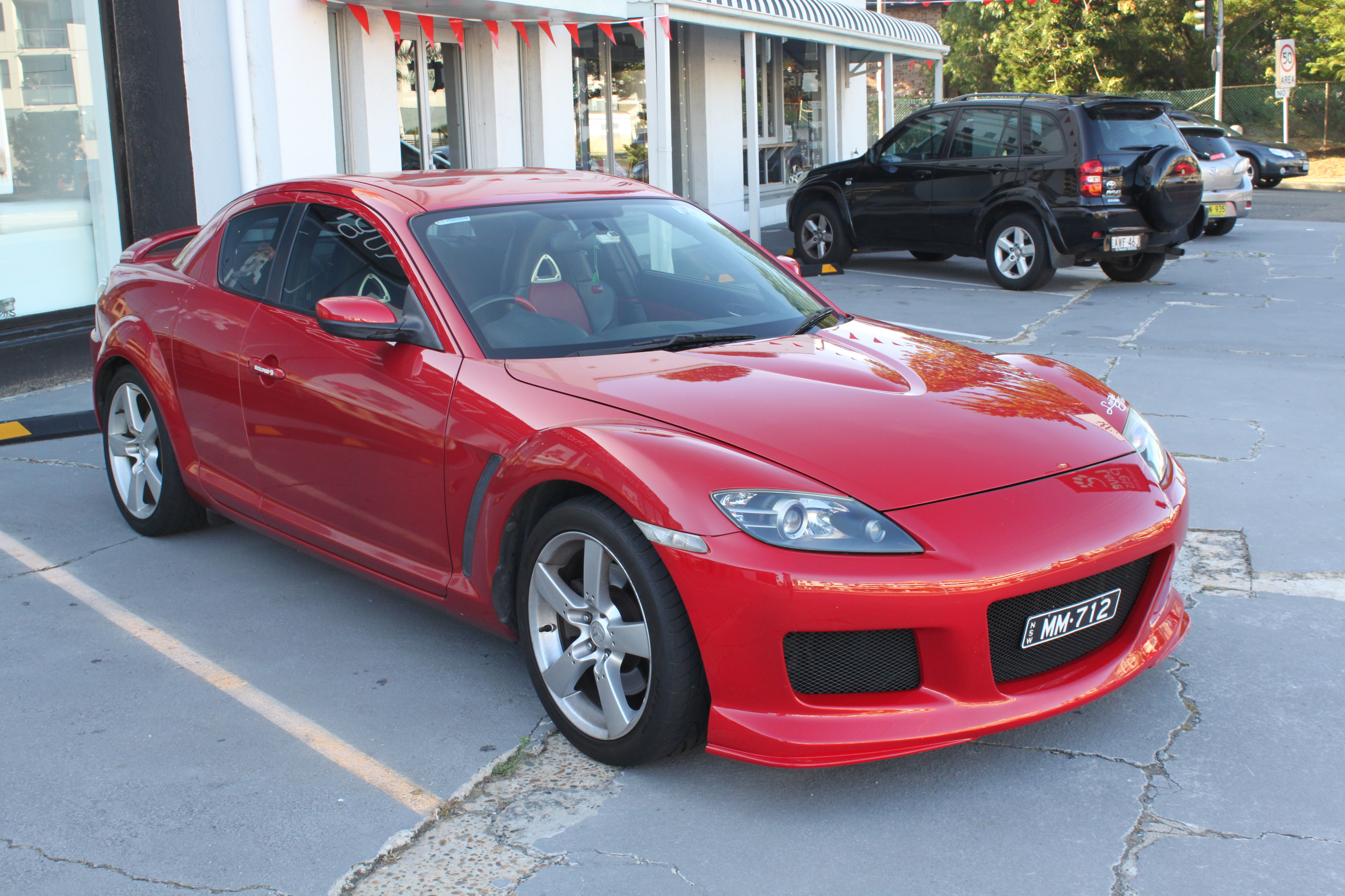 Mazda RX-8